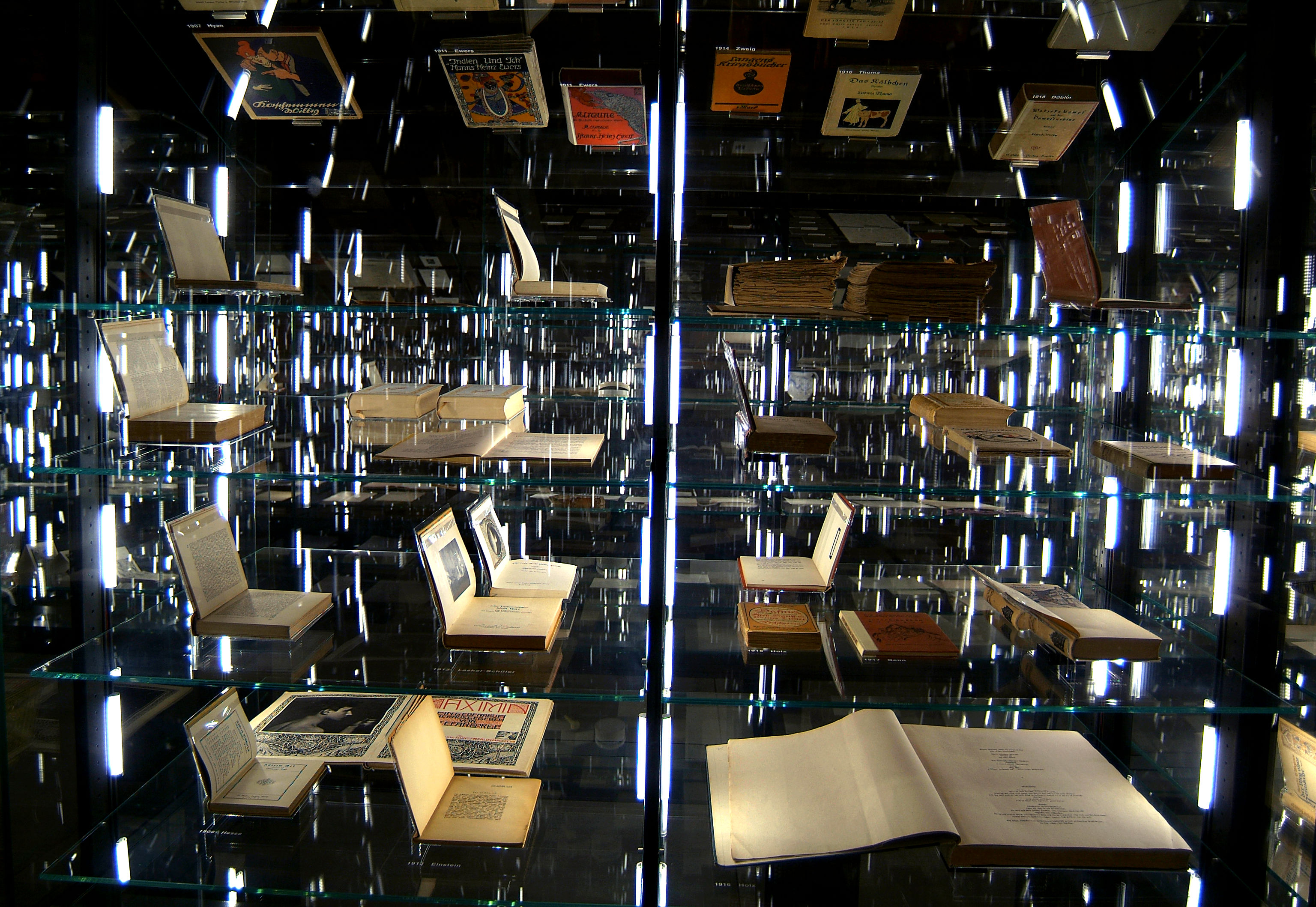 Blick in die Dauerausstellung des Literaturmuseums der Moderne, den sogennanten "nexus".